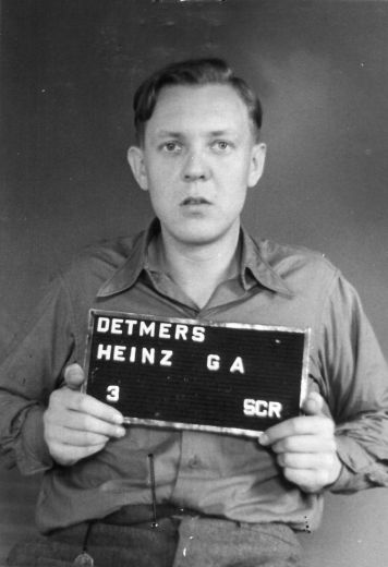 Haftbogenfoto des Angeklagten Heinrich Georg Alfred Detmers (20.04.1919 in Norden/Ostfriesland - 08.06.1999 Weddelbrook), SS-Obersturmführer, Angehöriger des Kommandanturstabes im Konzentrationslager Dachau, Adjutant des Kommandanten und Gerichtsoffizier im Konzentrationslager Mittelbau-Dora, im Dachauer Folgeprozess Case No. 000-50-2-23 (US vs Alex Piorkowski et al) am 17.01.1947 zu fünfzehn Jahren Haft verurteilt, die in fünf Jahre umgewandelt wurden, im Dachauer Dora-Prozess ("Case No. 000-50-37 Dora") am 30.12.1947 zu sieben Jahren Haft verurteilt.